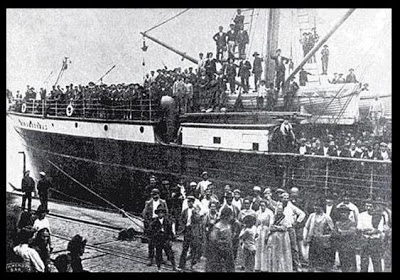 Llegada de inmigrantes italianos al puerto de Veracruz a finales del siglo XVIII